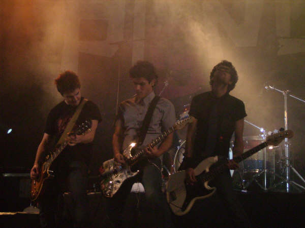 Pignoise durante su concierto el 25 de marzo de 2007 en Pucela (España).